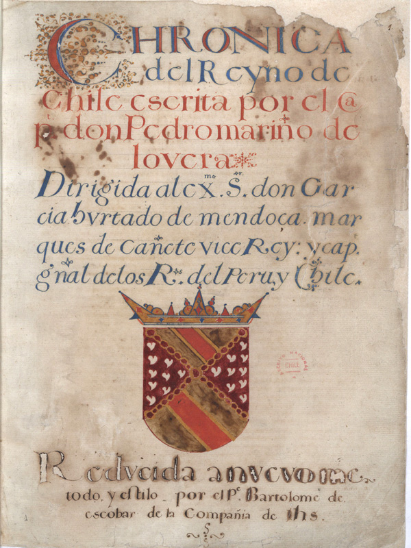 Pedro Mariño de Lovera. Crónica del Reino de Chile escrita por el capitán Pedro Mariño de Lovera. Dirigida al excelentísimo Señor don García Hurtado de Mendoza, Marqués de Cañete, vice rey y capitán general de los reinos del Perú y Chile. Reducida a método y estilo por el padre Bartolomé de Escobar de la Compañía de Jesús. Archivo Nacional Histórico. En Bóveda.